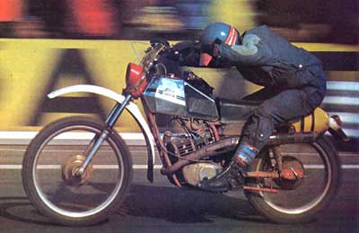 1976 - Josef Sirůček, Mezinárodní motocyklová šestidenní, Zeltweg, Rakousko